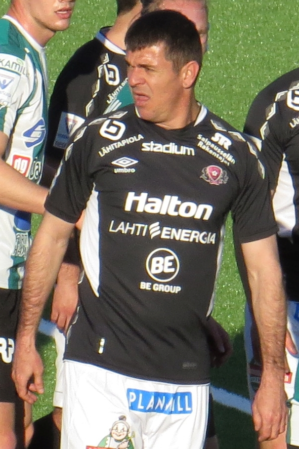 Rafael, brasilialainen jalkapalloilija FC Lahden joukkueessa kaudella 2015.